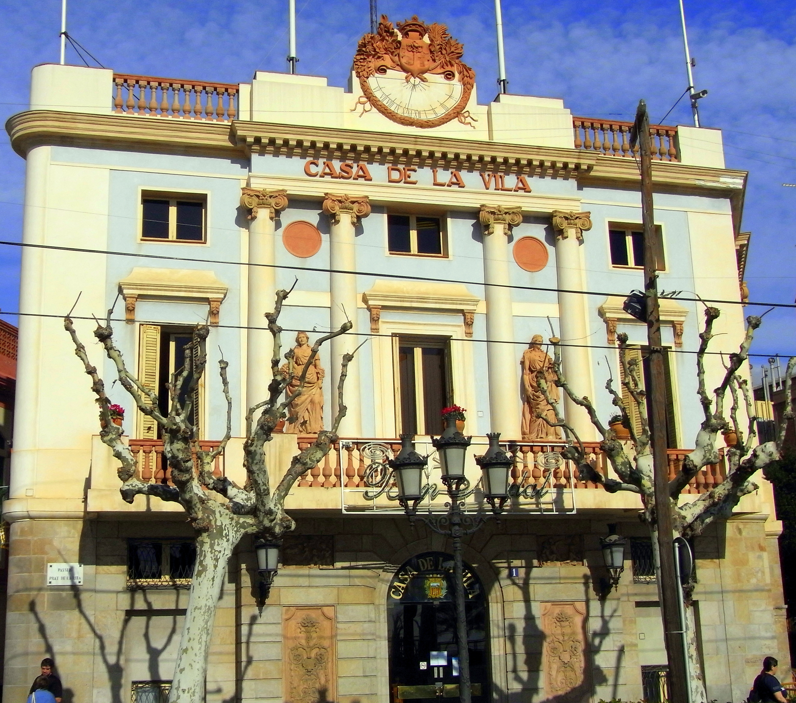 Ajuntament (El Masnou)